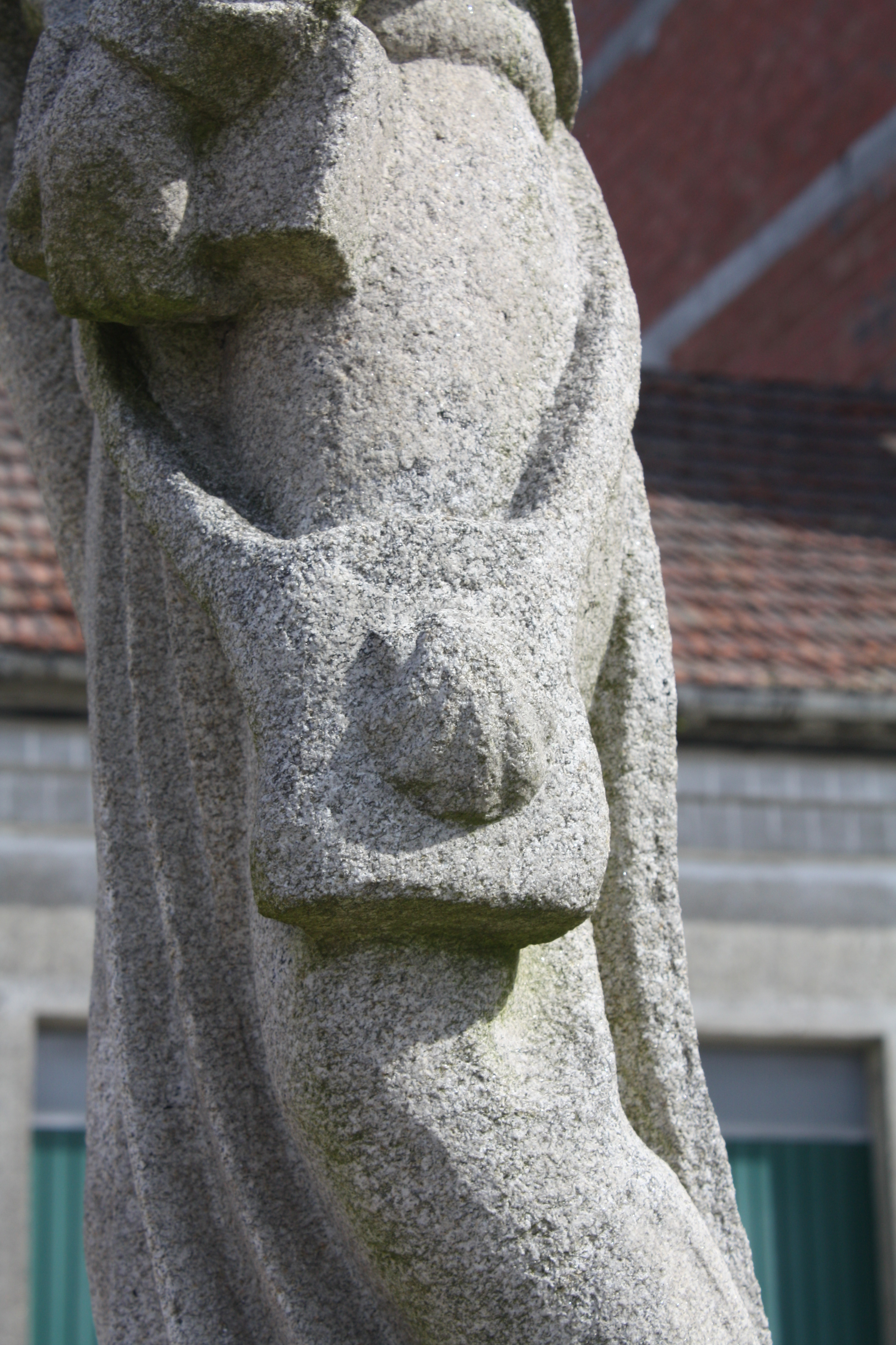 Detalle da cuncha no zurrón da estatua de Santiago peregrino en Palas de Rei, na travesía do Peregrino (Camiño de Santiago Francés)